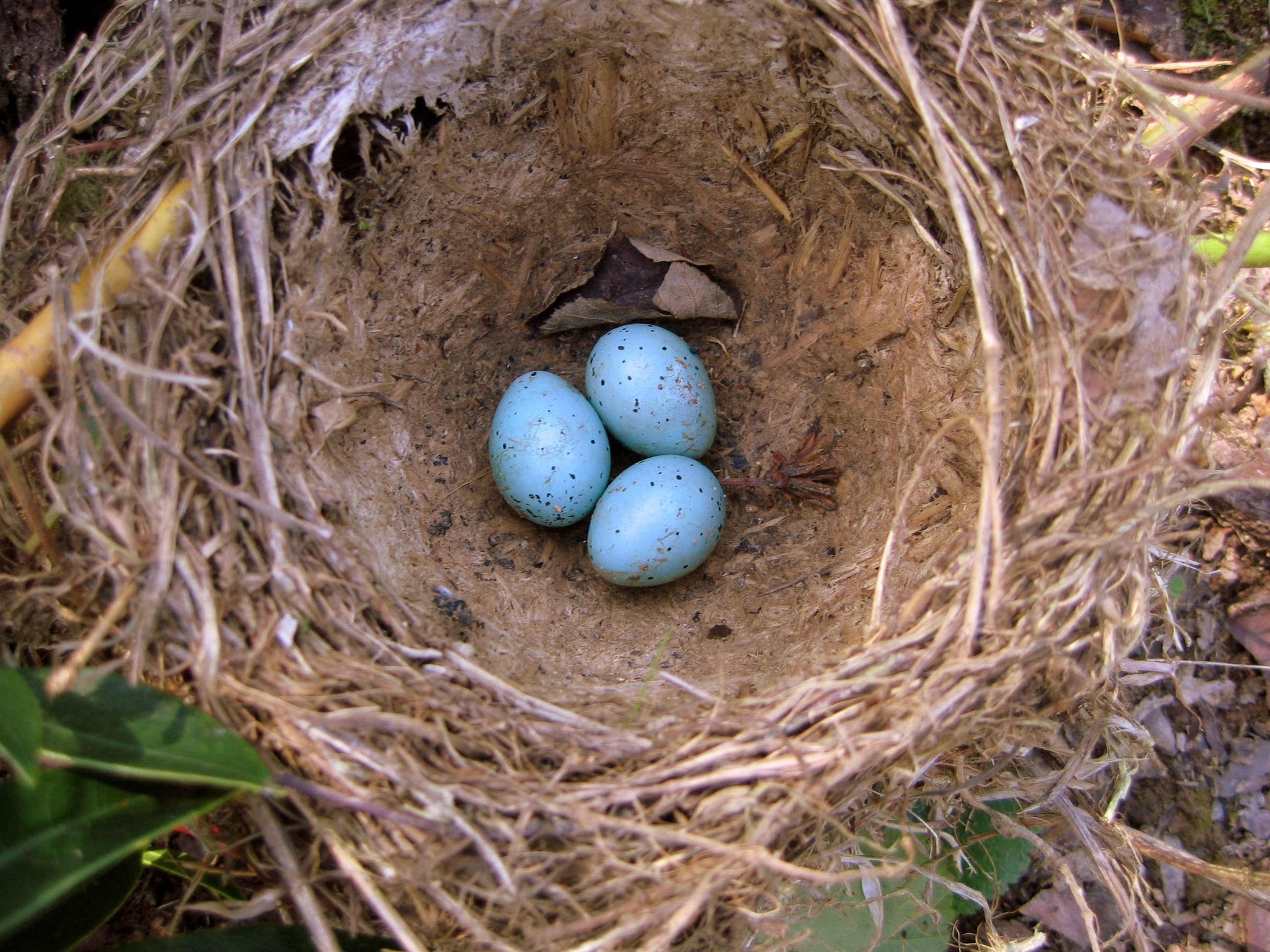 Un nid de grive musiciennne (Turdus philomelos) et 3 œufs, en Bretagne